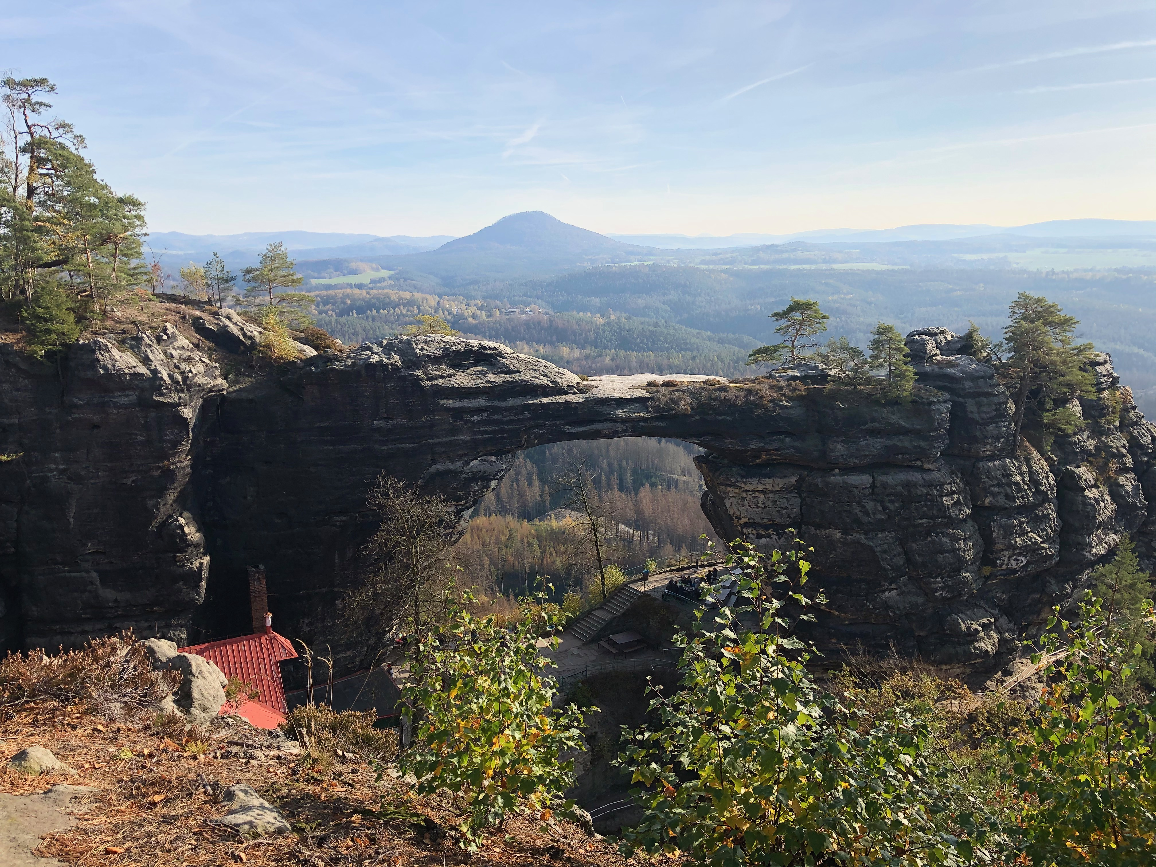 Чешская швейцария Правичские ворота